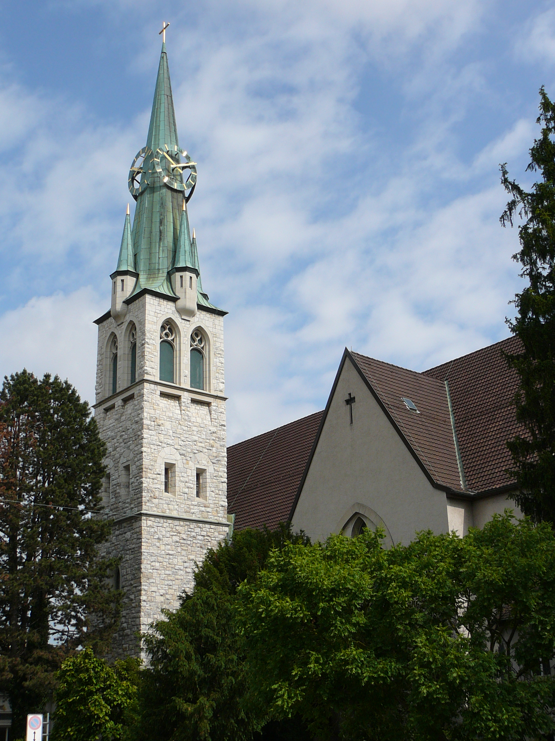 Römisch-katholische Kirche Herz Jesu Oerlikon, Blick von der Schwamendingerstrasse